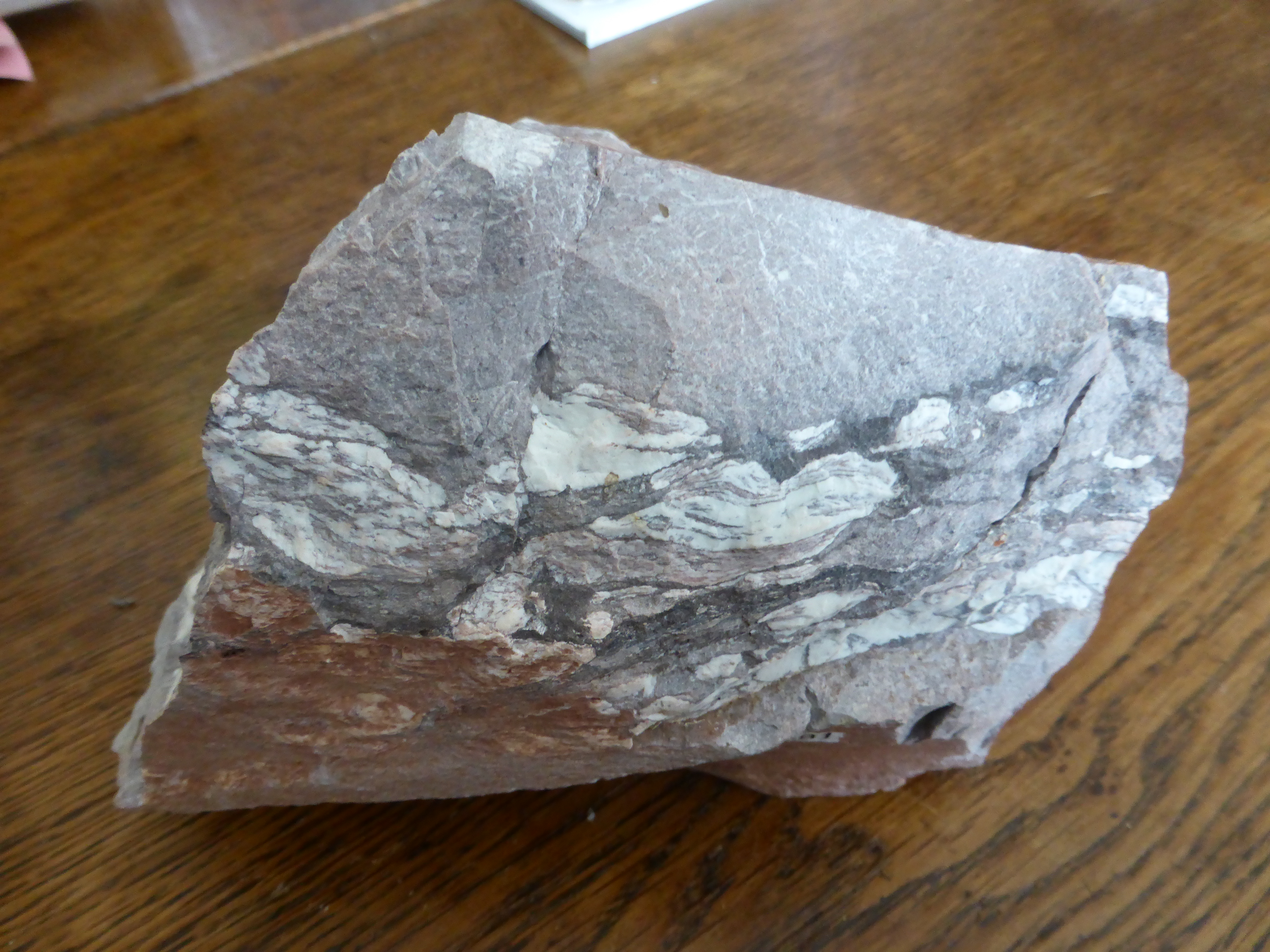 Combarbalite grise et blanche